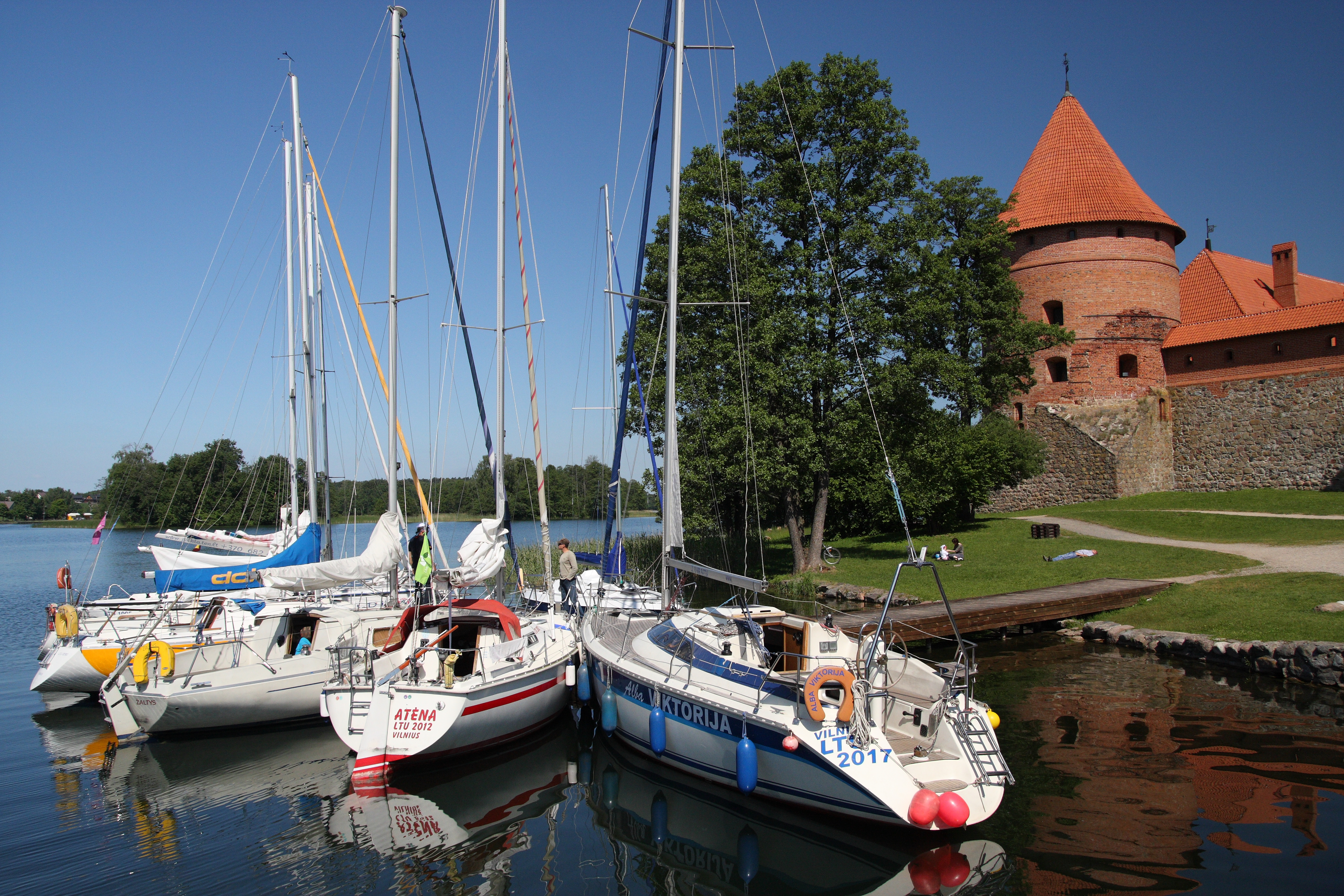 Trakai, Lithuania